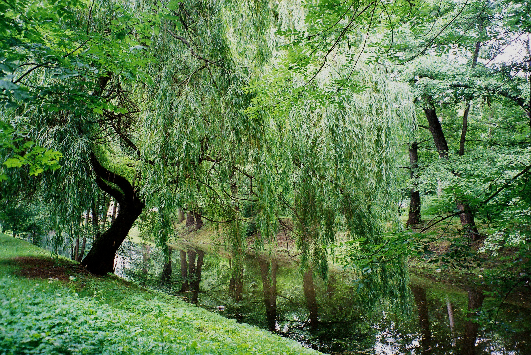 Świdnica, ulice Kolejowa, Spacerowa, Armii Krajowej i Czarna Droga - park miejski tzw. "Młodzieżowy"